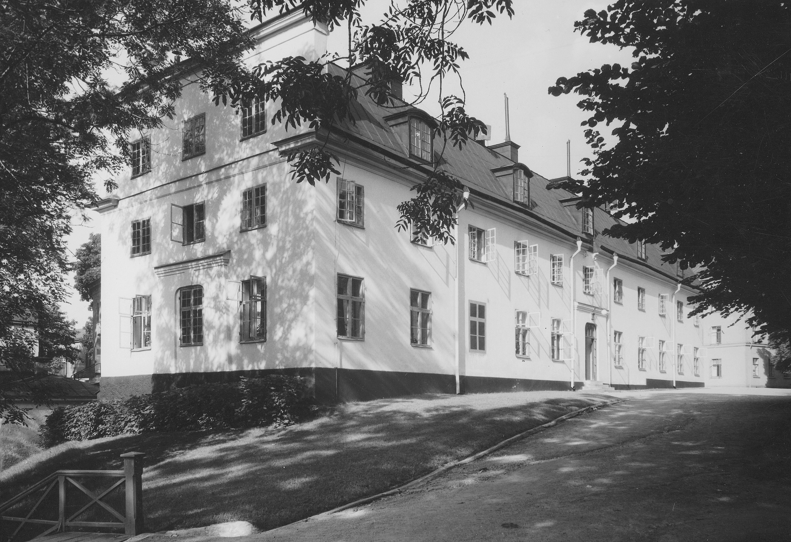 Ålderdomshemmet Katarinahuset Sabbatsberg